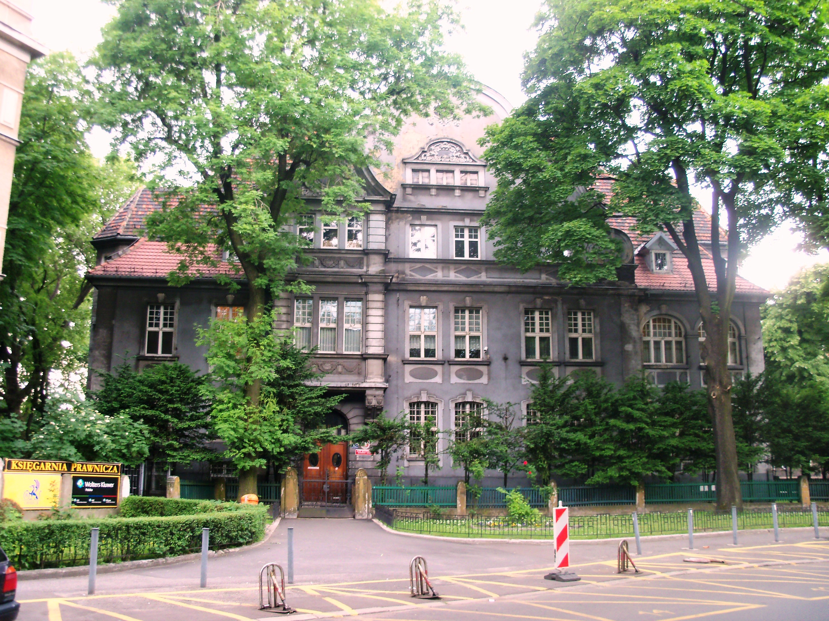 Katowice, pl. Wolności 10 - willa ogrodowa (1907-1909), obecnie siedziba "Pionu Karnego Sądu Rejonowego Katowice−Zachód" (zabytek nr A/1455/91)